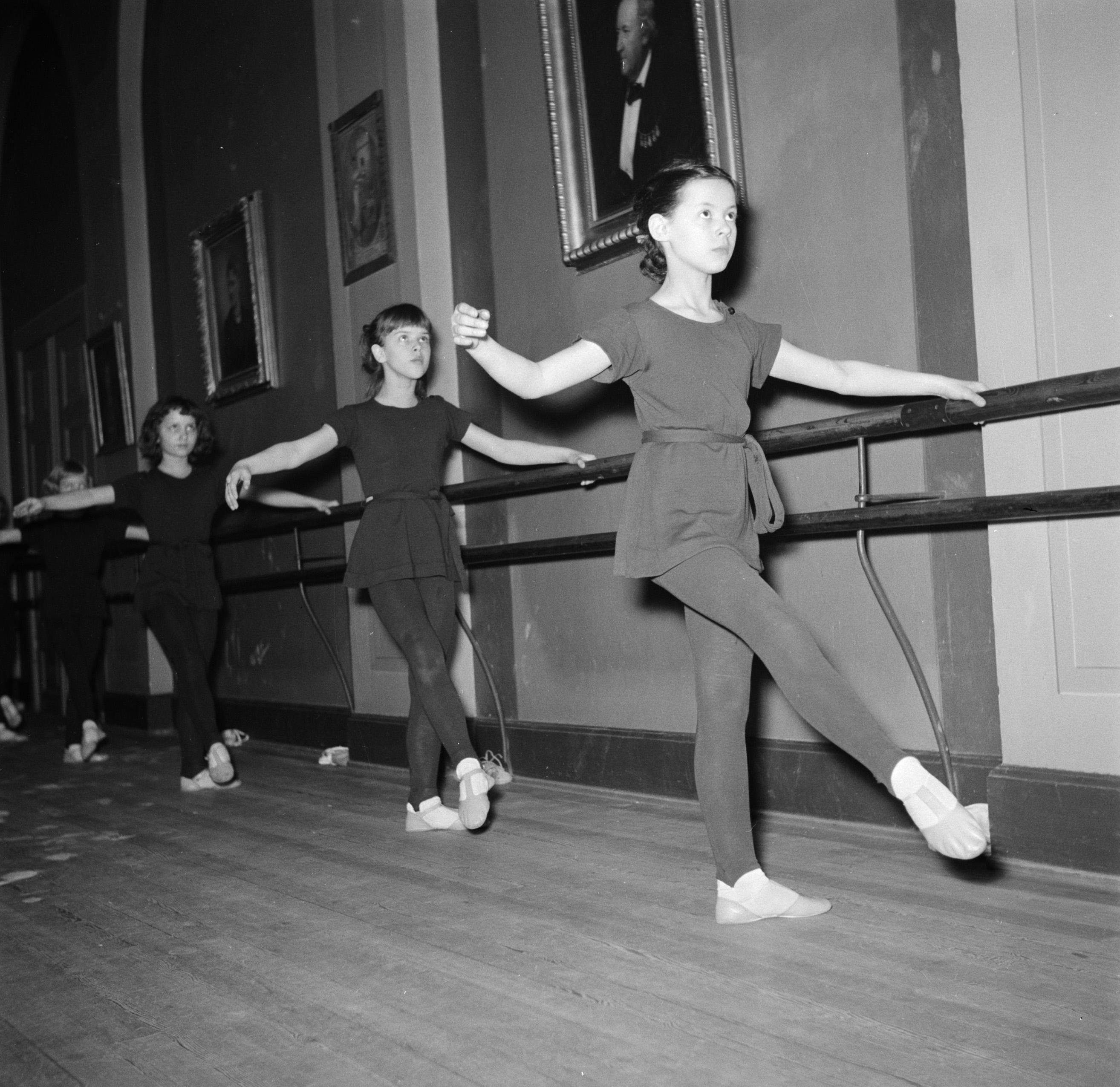 Collectie / Archief : Fotocollectie Van de Poll Reportage / Serie : De opleiding van het koninklijk Deens ballet Beschrijving : Kinderen krijgen les aan de barre in een oefenruimte Datum : maart 1954 Locatie : Denemarken, Kopenhagen Trefwoorden : ballet, dansen, dansers, dansopleidingen, kunstzinnige vorming, onderwijs Instellingsnaam : Koninklijke Balletschool Fotograaf : Poll, Willem van de, [onbekend] Auteursrechthebbende : Nationaal Archief Materiaalsoort : Negatief (zwart/wit) Nummer archiefinventaris : bekijk toegang 2.24.14.02 Bestanddeelnummer : 252-9200